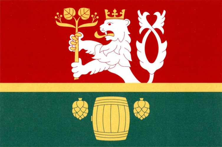 Vlajka, Pivkovice, okres Strakonice